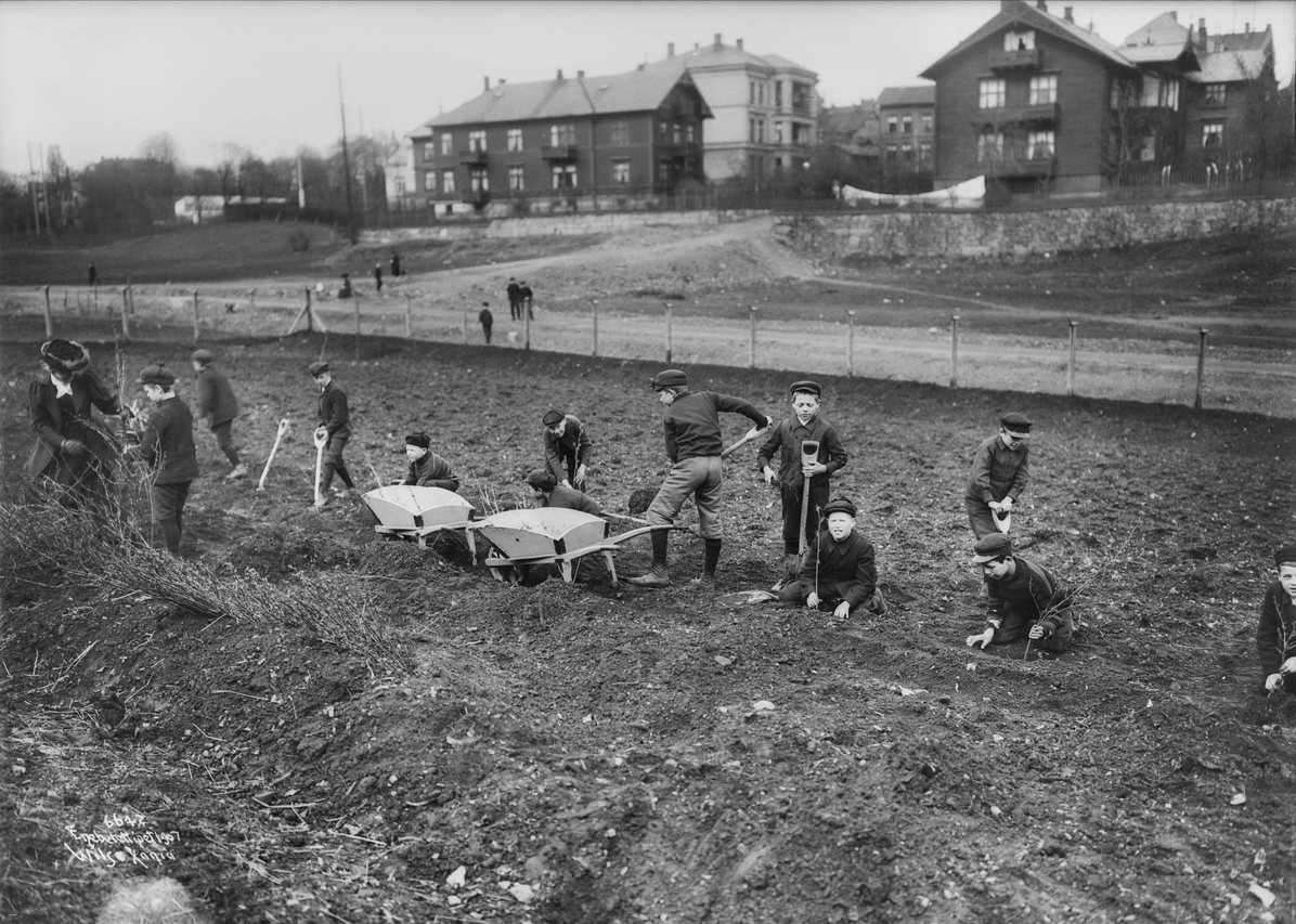 Skolehage på Bondejordet, sør for Gyldenløves gate og nåværende Arno Bergs plass. Oppover på bildet går Eilert Sundts gate. Til venstre for den ses Eilert Sundts gate 2 med nr. 4 bakom og bak den igjen nr. 8. Til høyre for gaten er nr. 7 med nr. 9 bakom. Foto: Anders Beer Wilse (1907). Fra Byhistorisk samling hos Oslo Museum.